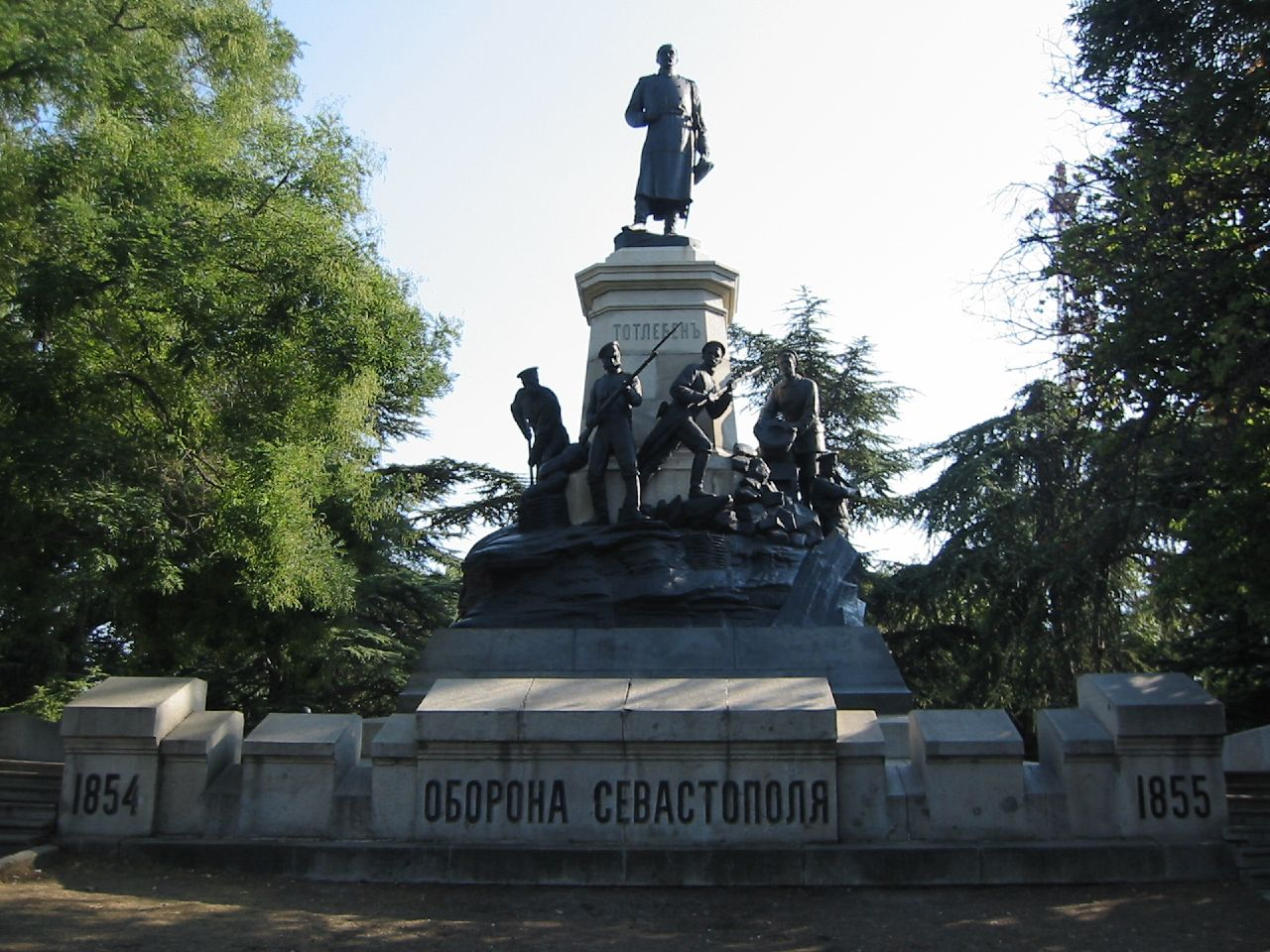 Оборона Севастополя, монумент